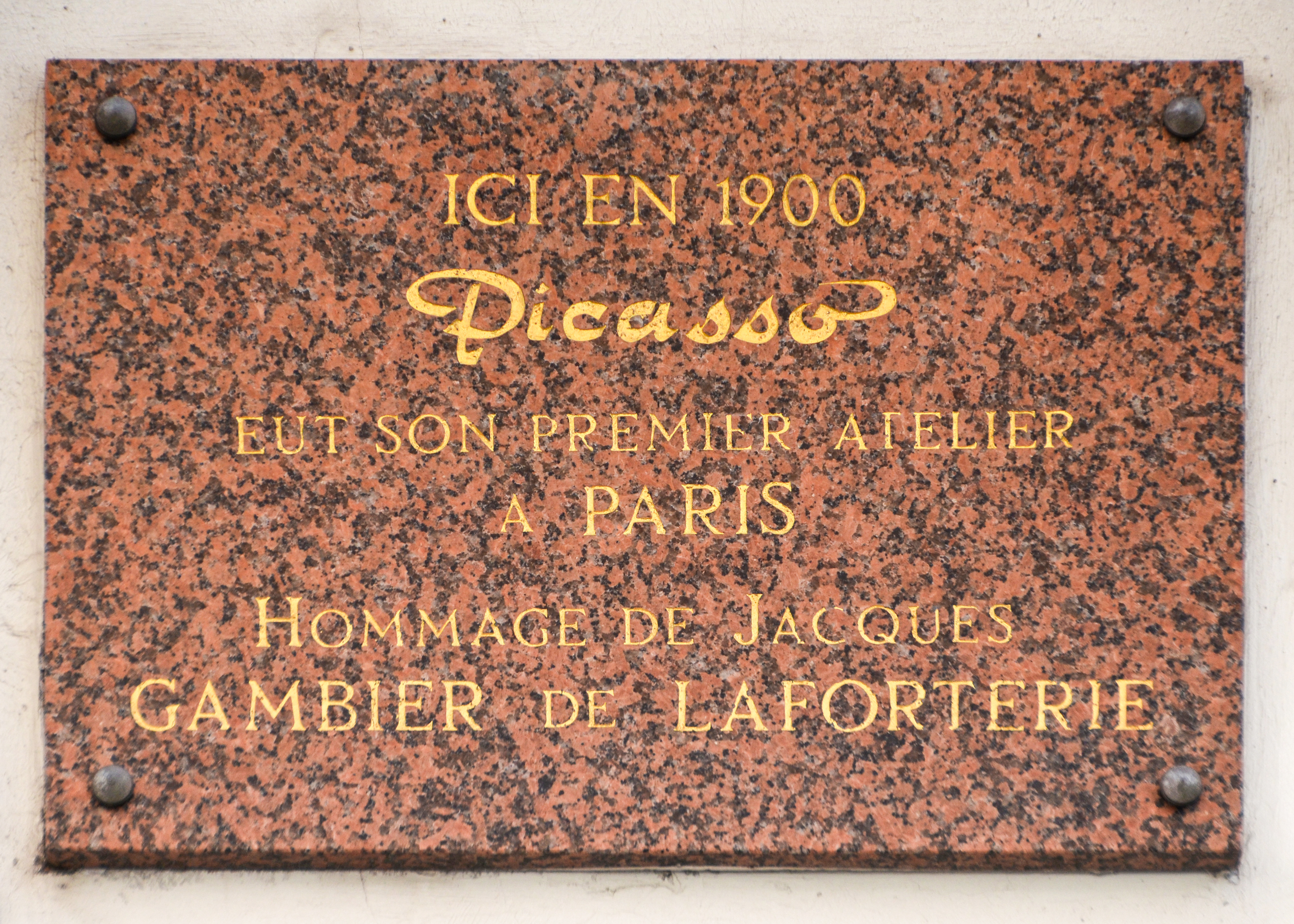 Picasso plaque - 49 rue Gabrielle, Paris 18